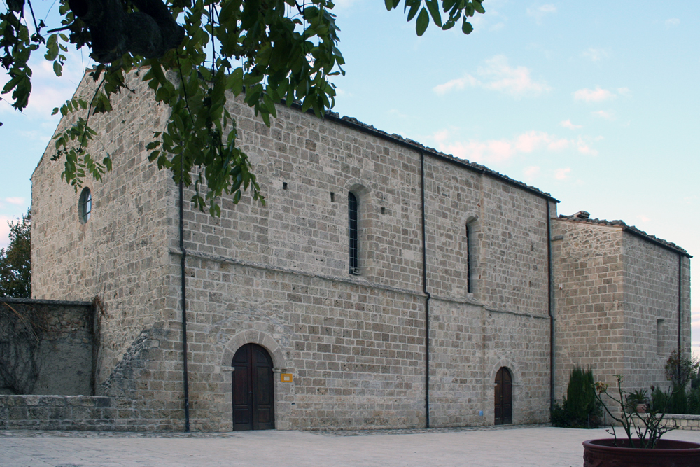 Fianco meridionale della chiesa dell'Abbazia di Montesanto. Un sentito ringraziamento a Don Galliano Ciccarelli, Diacono Pro Rettore dell'Abbazia di Montesanto, che ha consentito lo scatto di questa immagine.